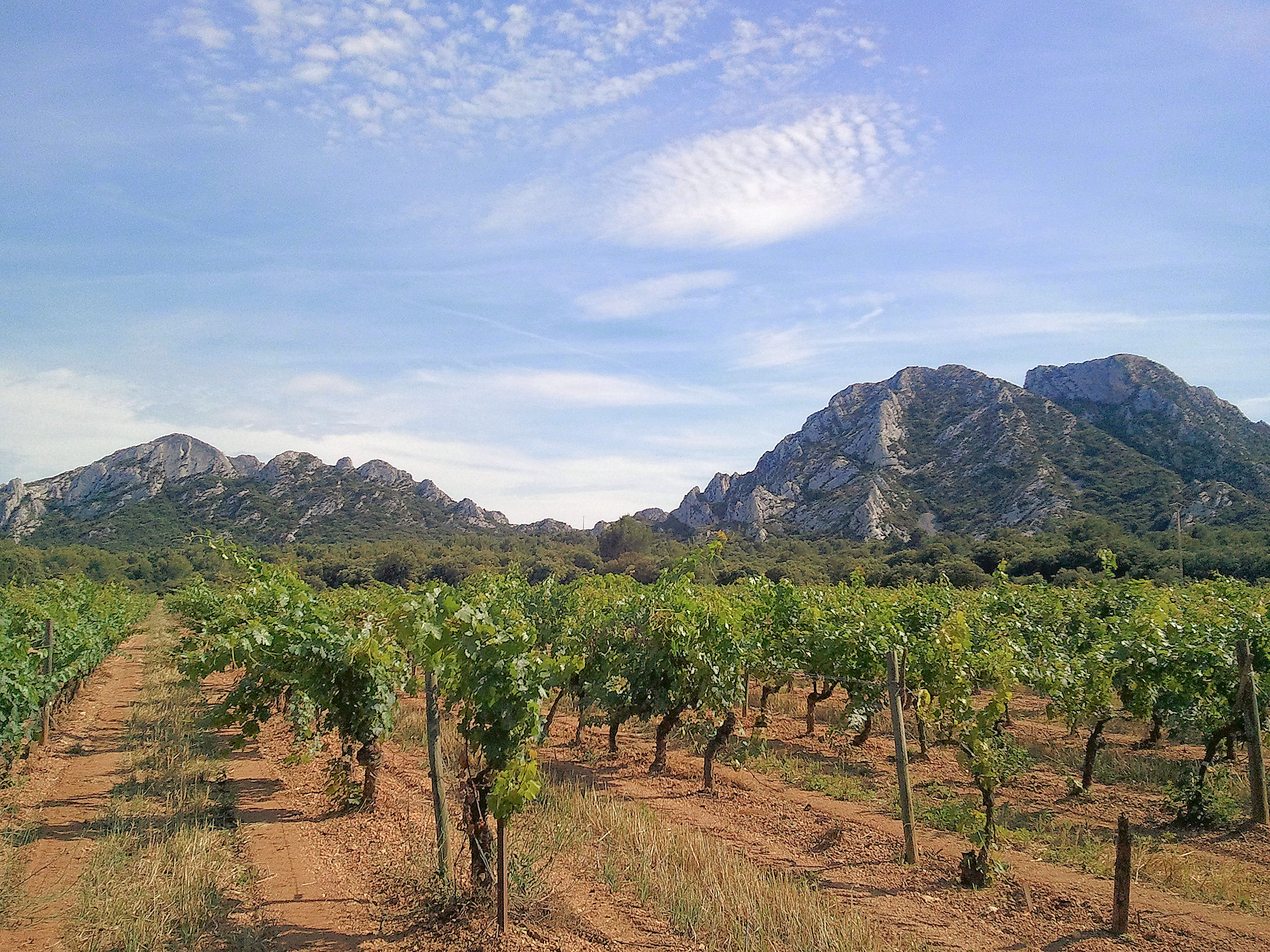 paysages Saint Rémy de Provence